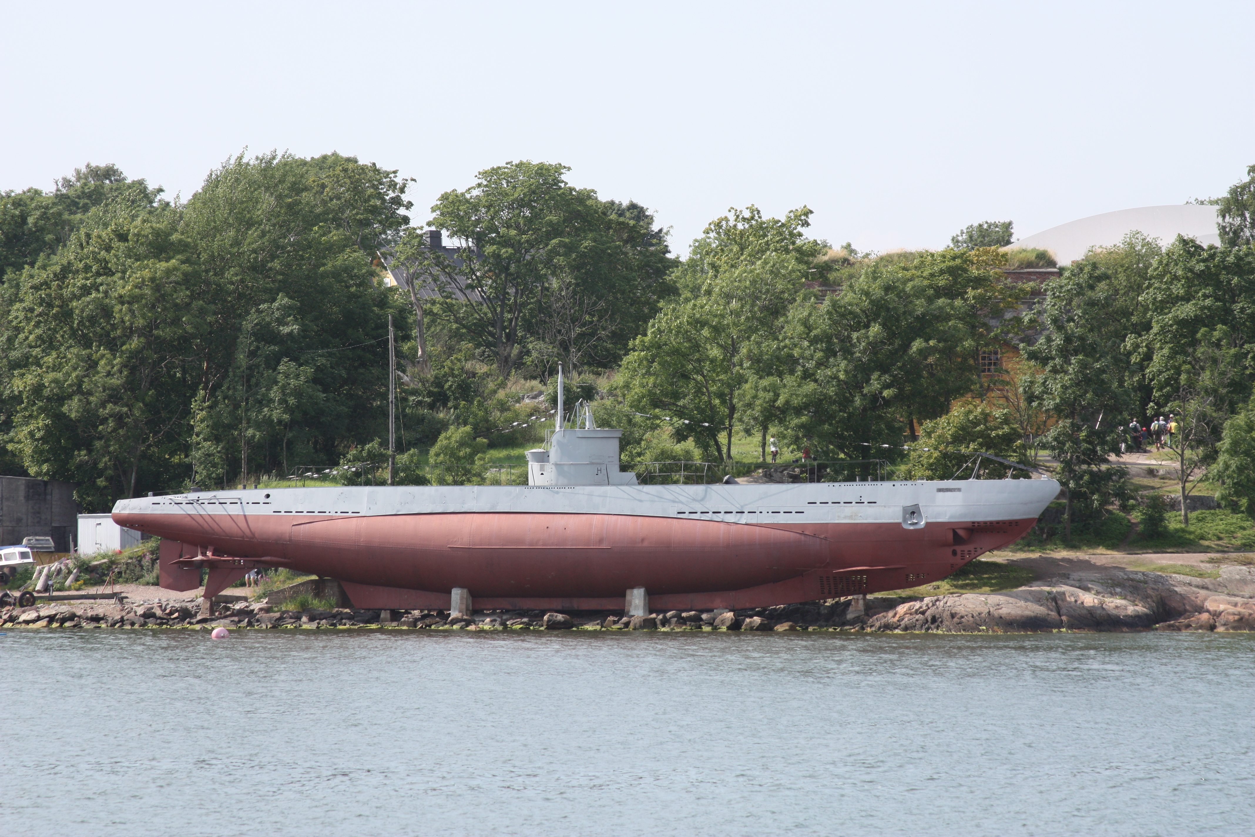 tourist pictures of Helsinki